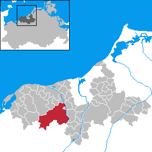 Satow in Mecklenburg-Western Pomerania - District Bad Doberan